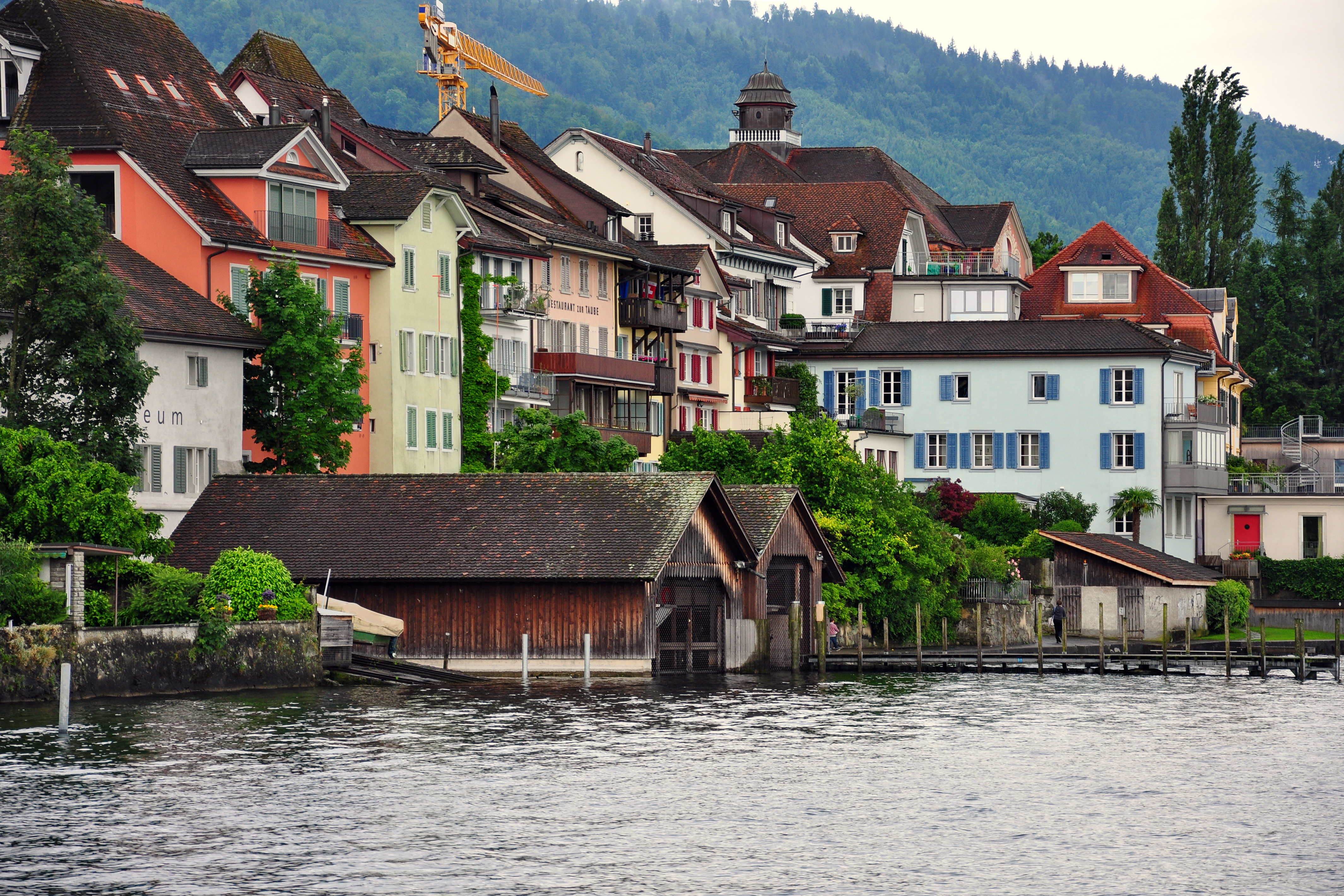 Unterstadt in Zug (Switzerland) as seen from Zugersee harbour